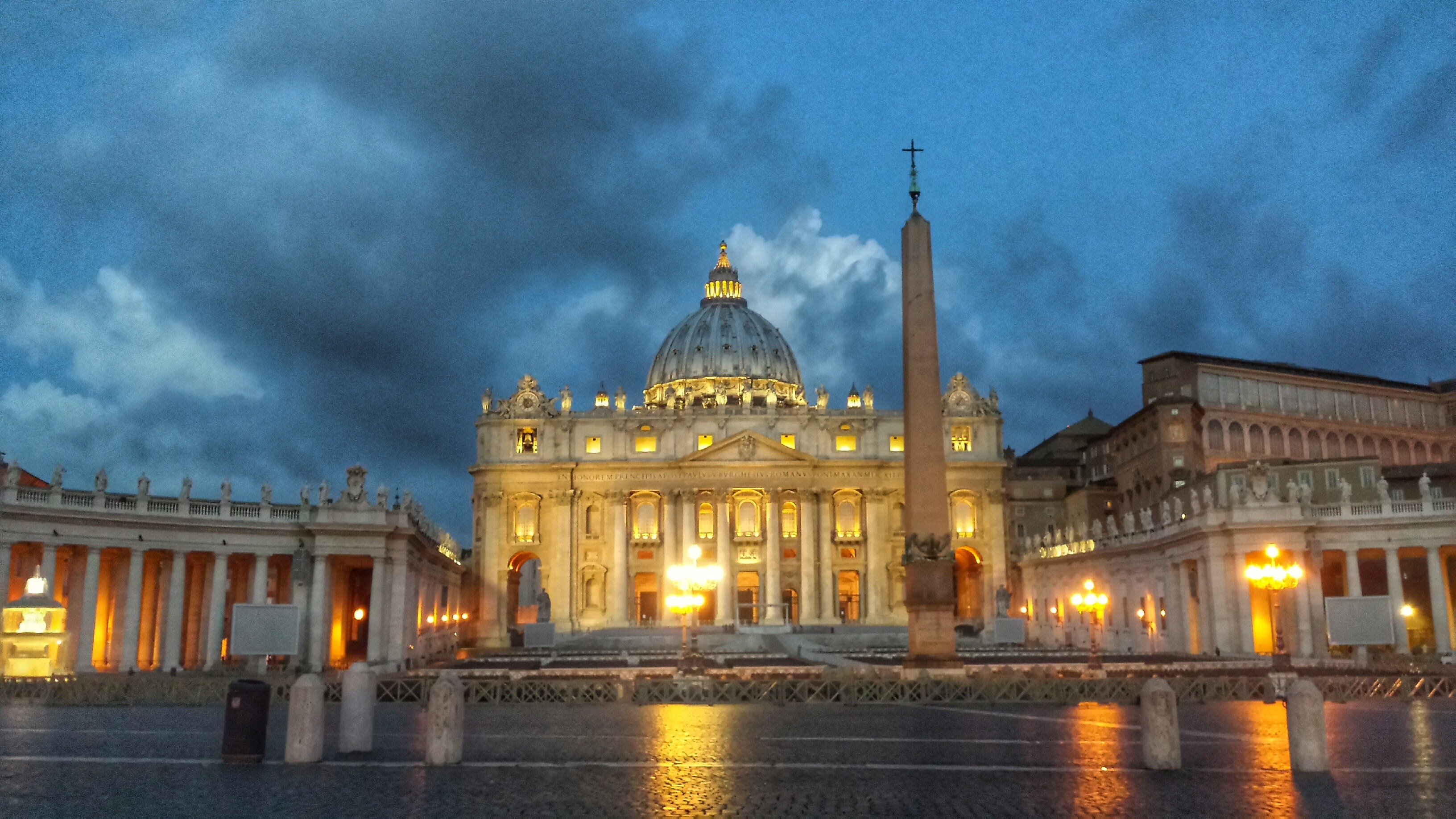 Petersdom im Vatikanstaat fotografiert am 7. Oktober 2015 gegen 6 Uhr morgens